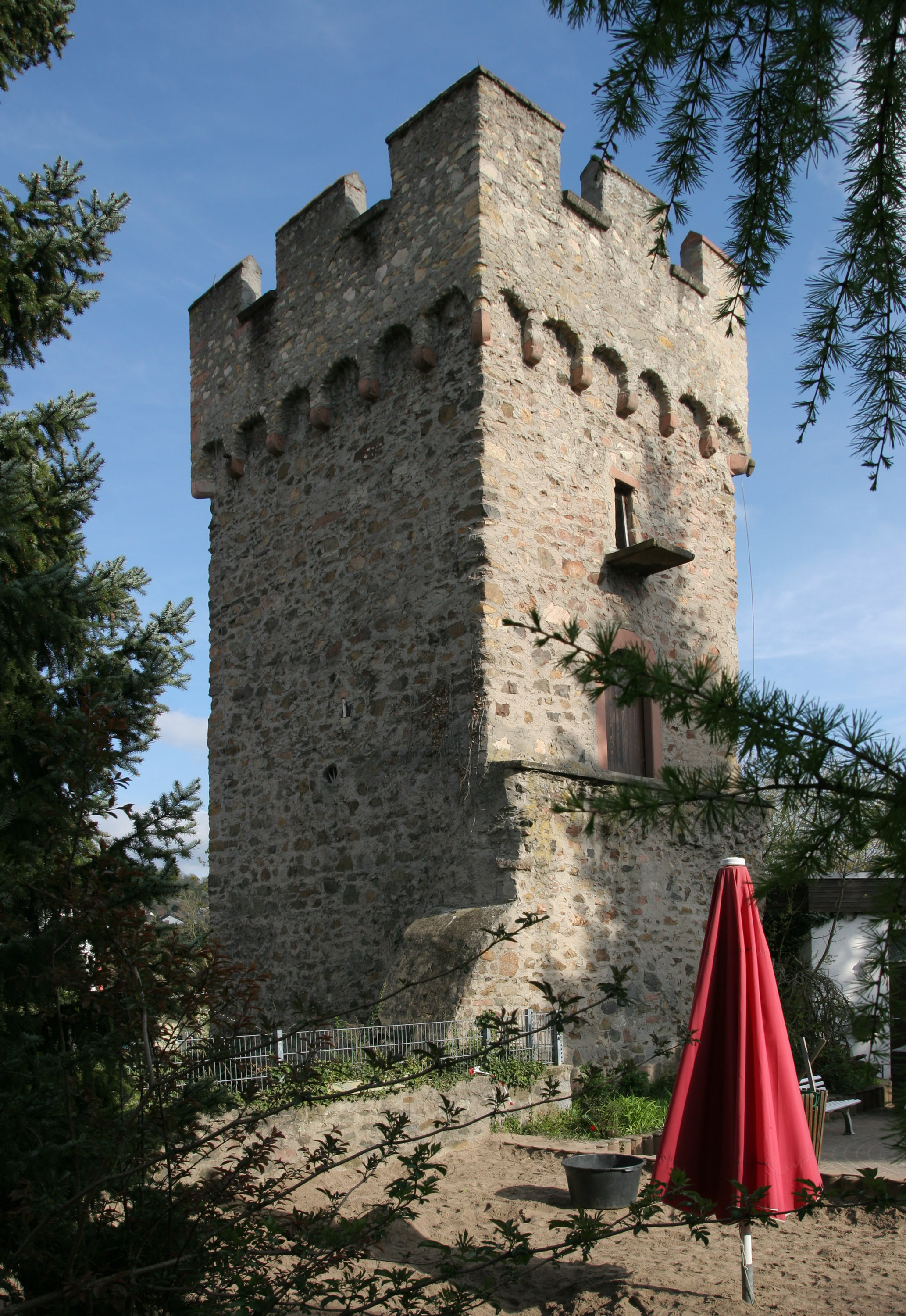 Der Rote Turm der Stadt Bensheim.